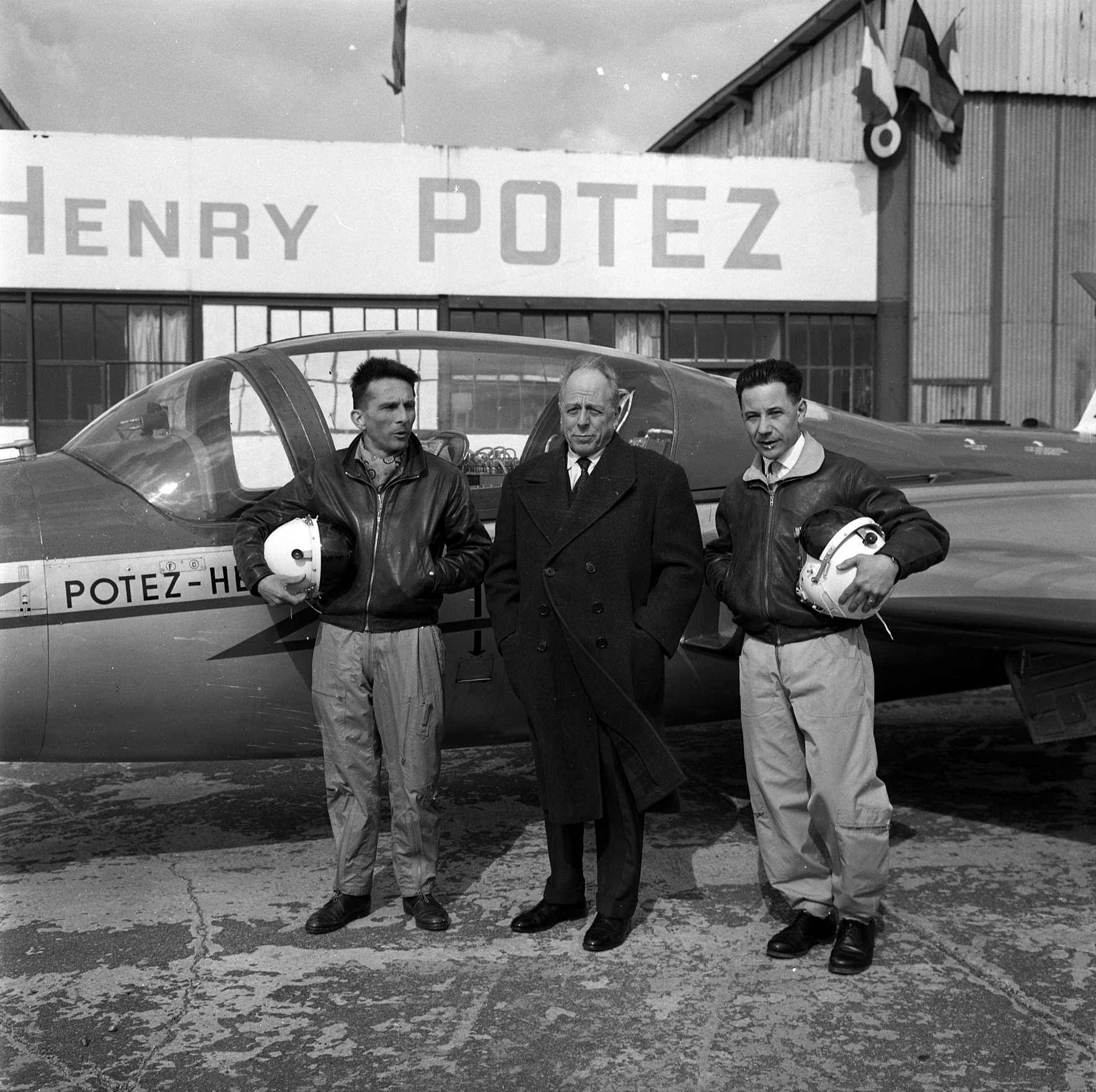 Blagnac. 22 mars 1962. 1er vol d'essai de l'avion à réaction Potez Heinkel-CM-191 : au 1er plan Henri Potez posant avec les deux pilotes Jacques Grangette (à gauche) et P. Canneil devant l'avion ; en arrière-plan hangar Henri Potez.